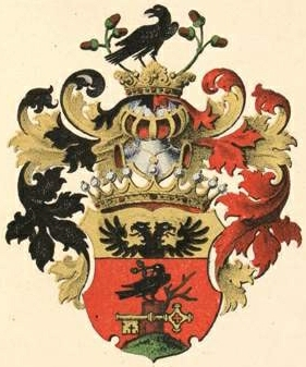 Bironi suguvõsa krahvivapp